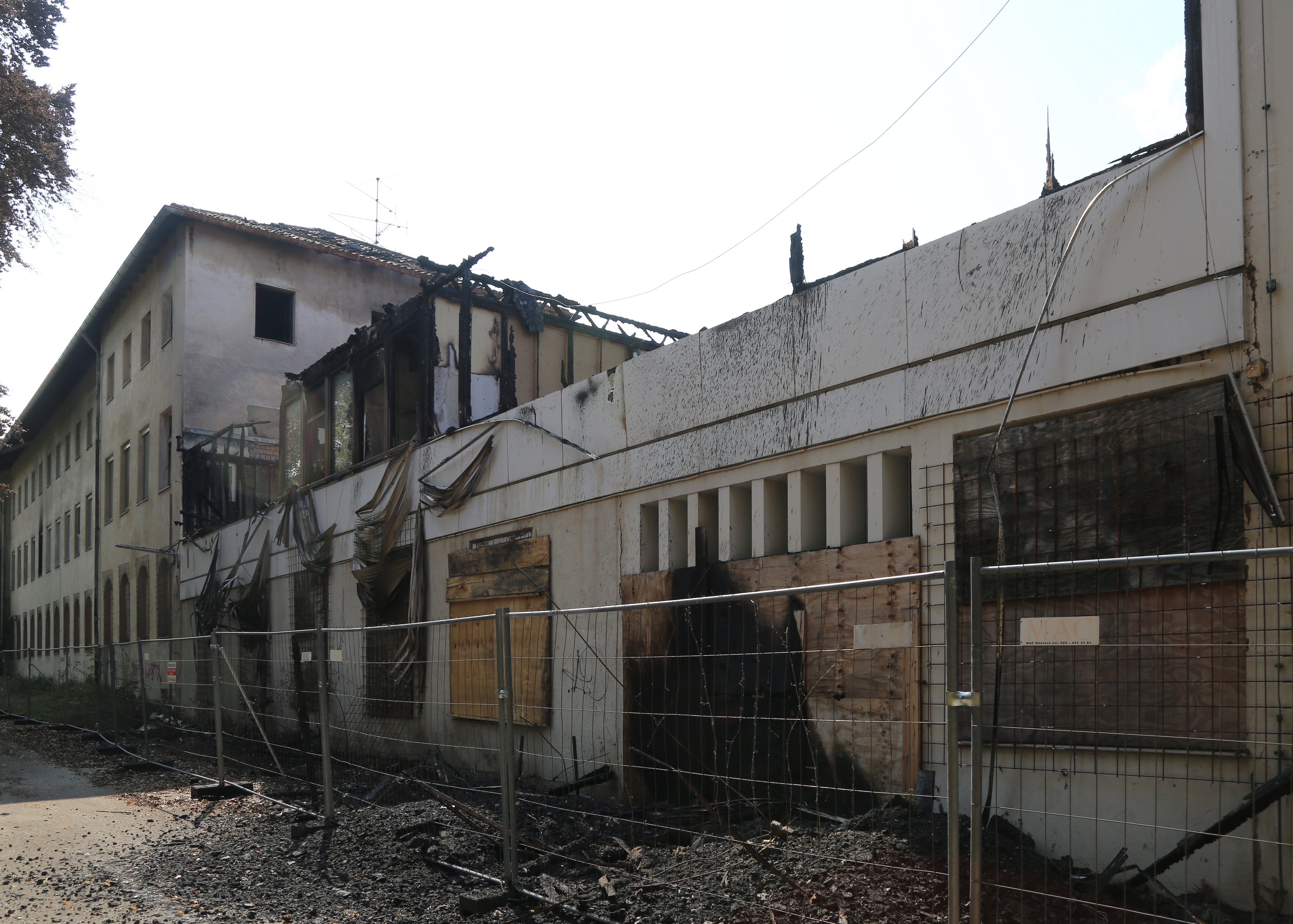 leerstehende ehemalige Landes-Gehörlosen-Schule München nach einem Feuer am 3. August 2020